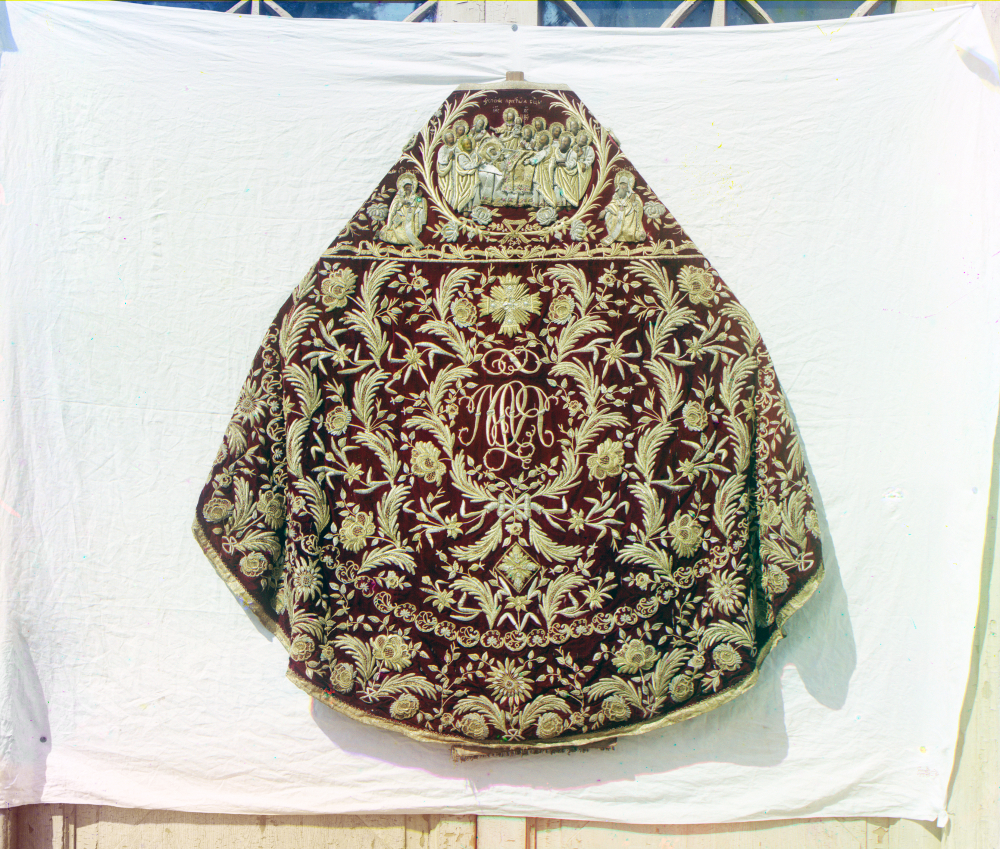 Фелонь. Времен Царя Михаила Федоровича.